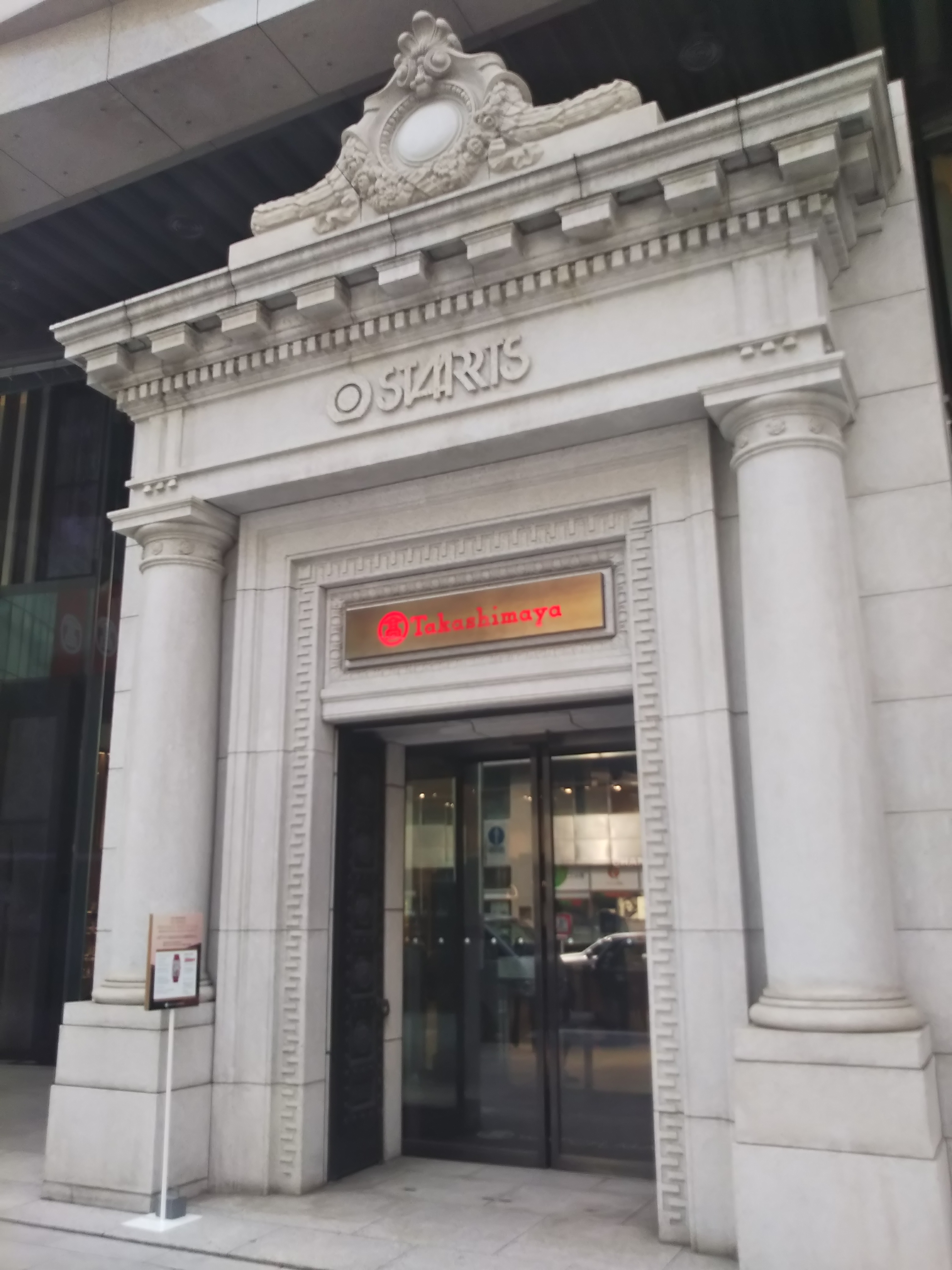 東京都中央区日本橋、スターツ日本橋ビルのエントランス